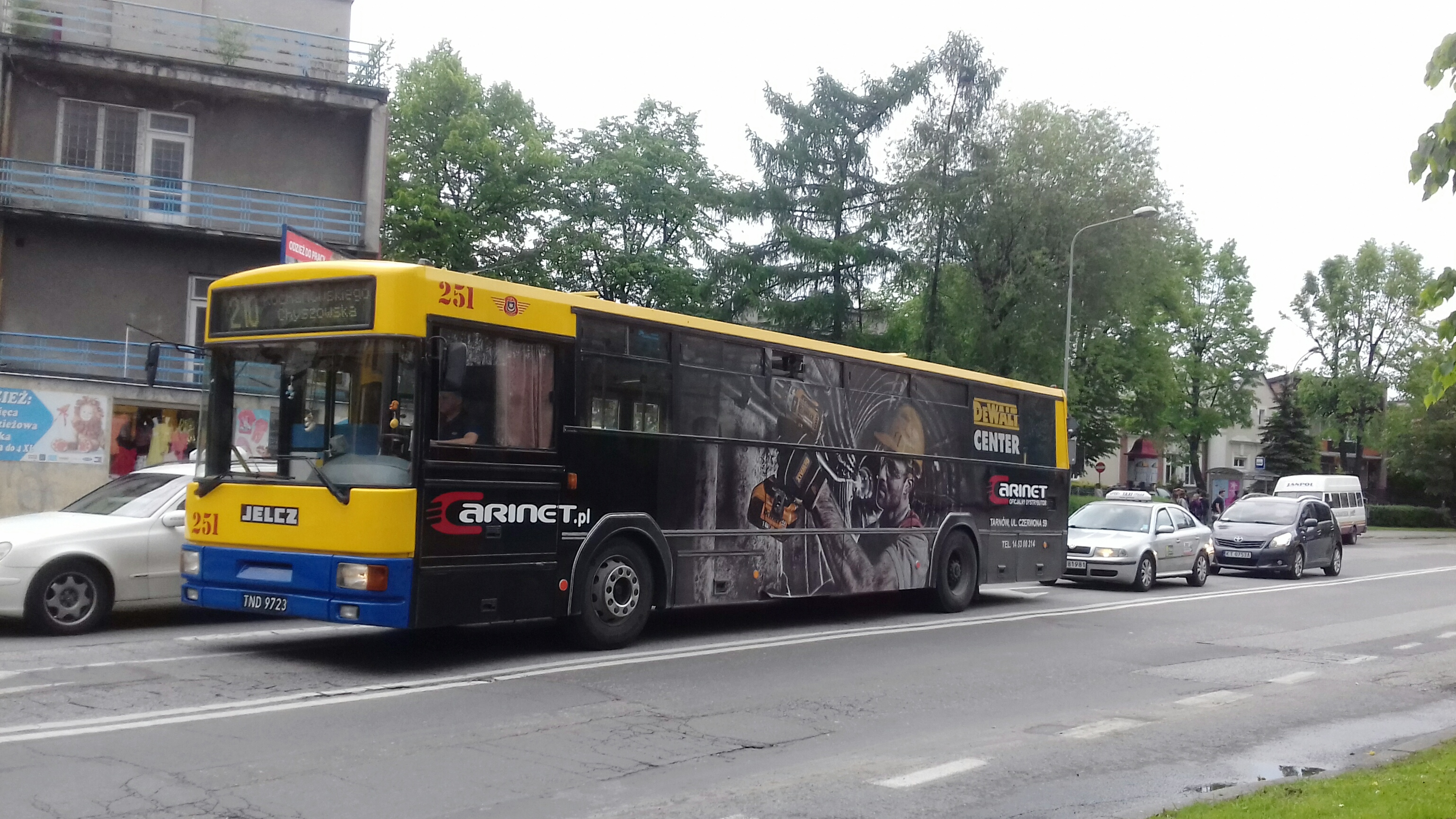 Jelcz 120MM/2 MPK Tarnów